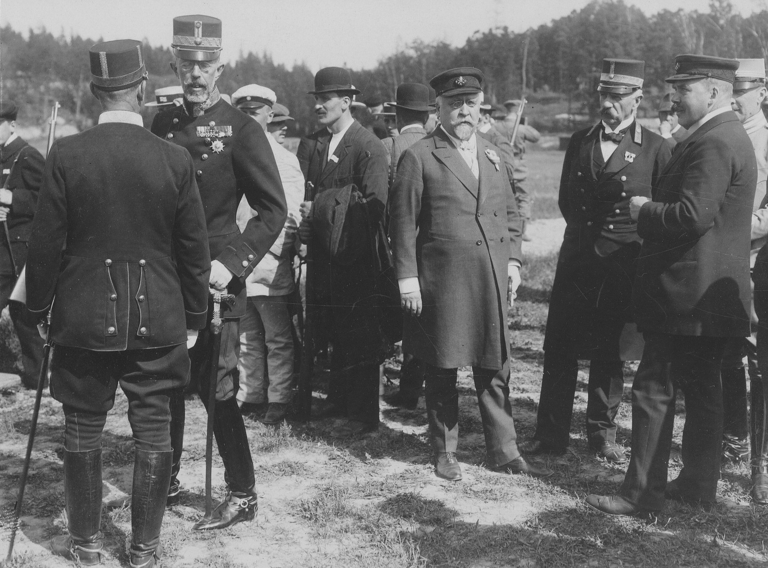 Stora Skuggans skjutbana, Riksskyttetävlingarna 1913, general Uggla, Gustav V.